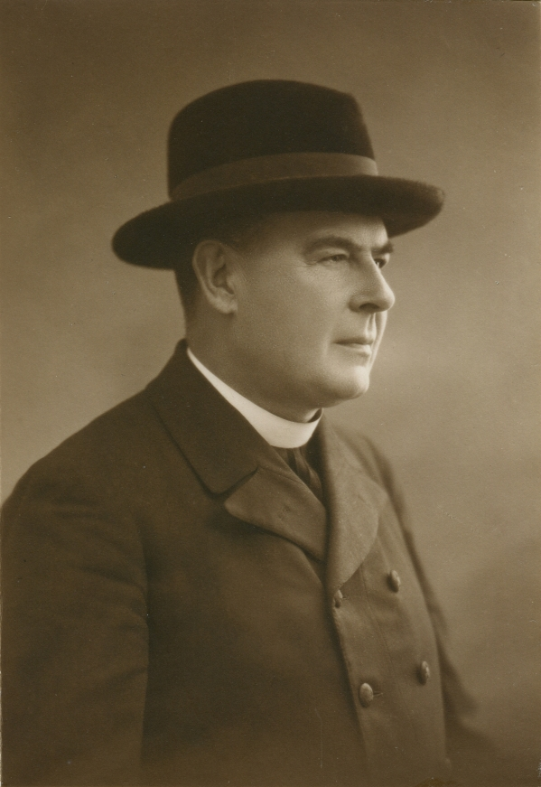 Doktor theologie Tomáš Hudec